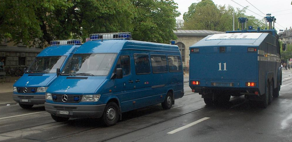 Ordnungsdienstfahrzeuge der Stadtpolizei Zürich